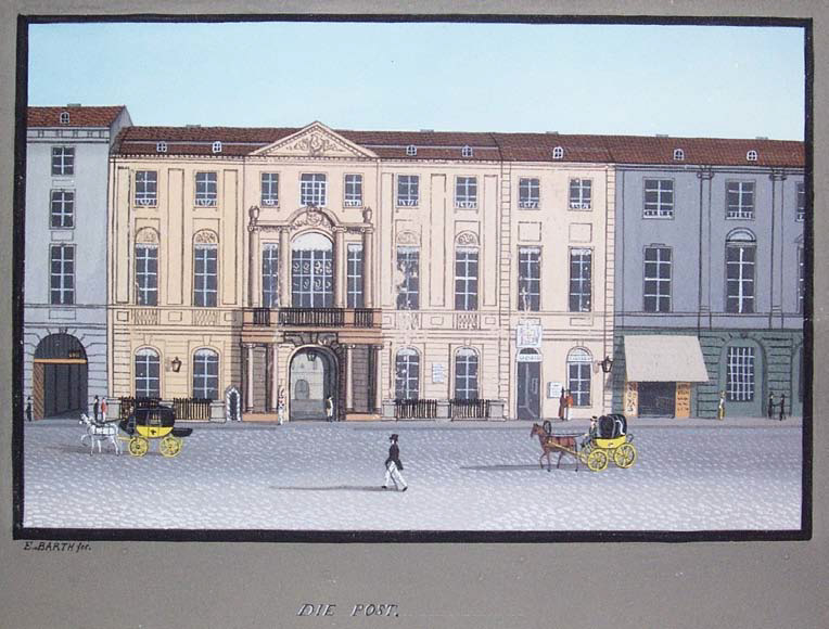 Das Postgebäude in der Königstraße 60 in Berlin (ehemaliges Palais Grumbkow). Umrisskupfer (koloriert) von Eduard Barth